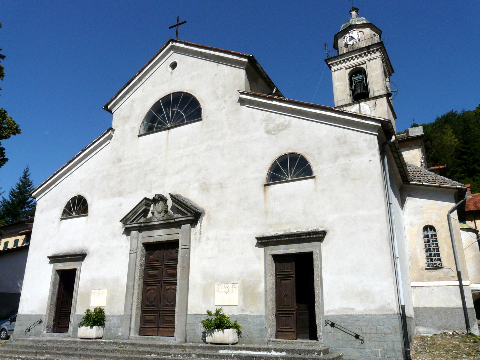 Facciata della chiesa di Santa Croce, Crocefieschi, Liguria, Italia